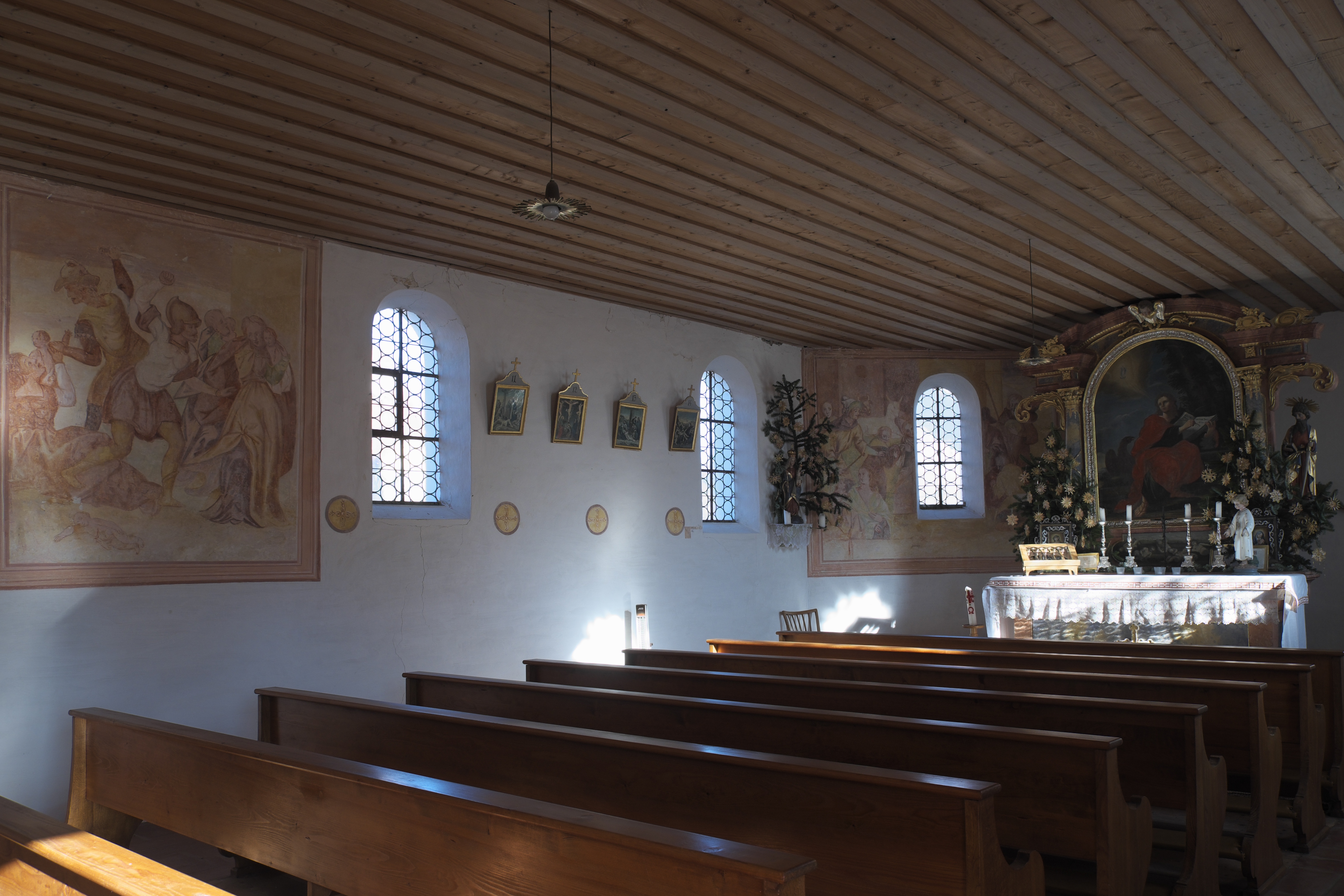 Katholische Filialkirche der Unschuldigen Kinder in Essenbach (Odelzhausen) im Landkreis Dachau (Bayern/Deutschland), Innenraum